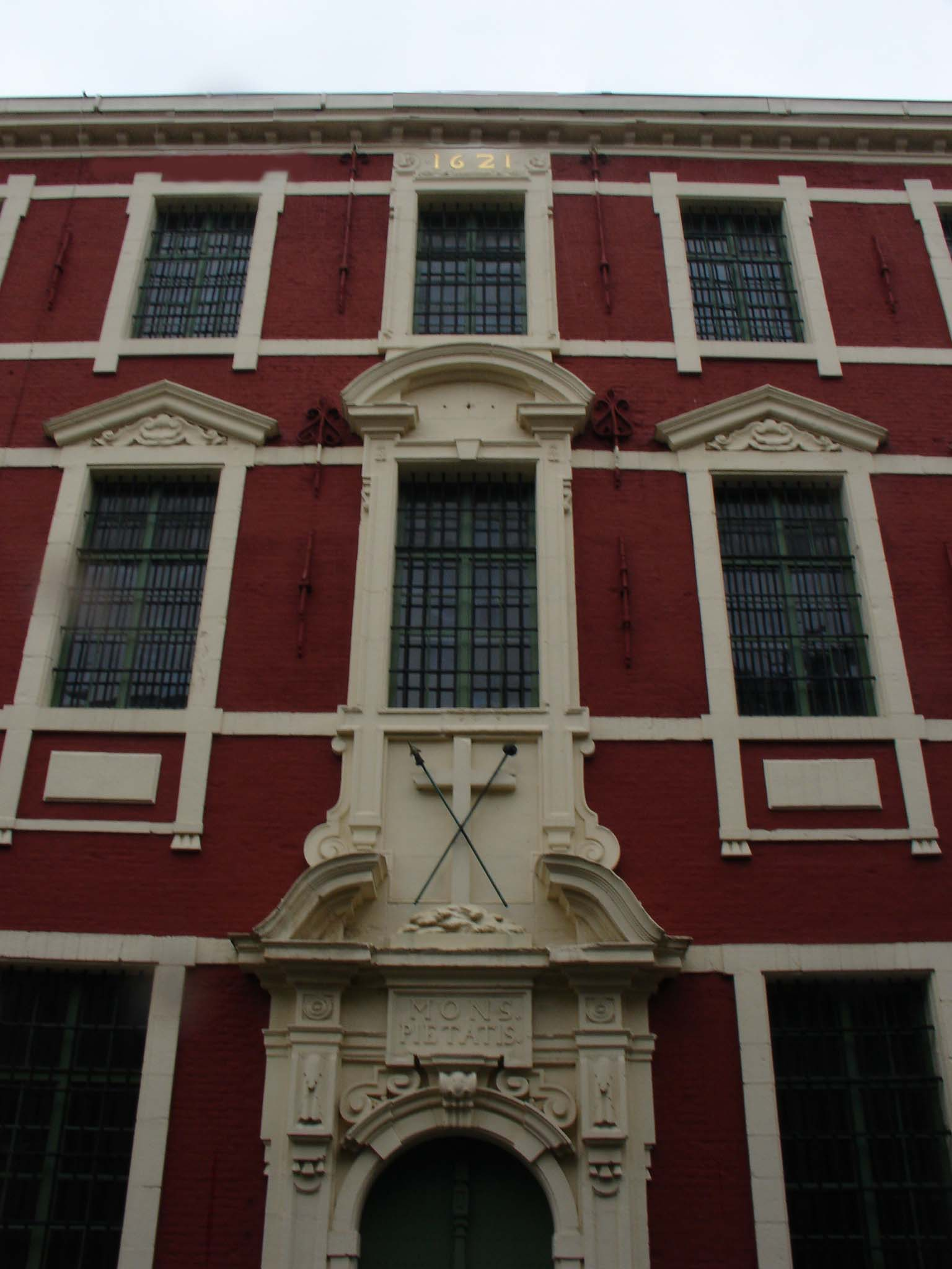 'Berg van Barmhartigheid', het 17e eeuwse gebouw waar tot voor kort het Gentse stadsarchief was ondergebracht. Eigen werk.